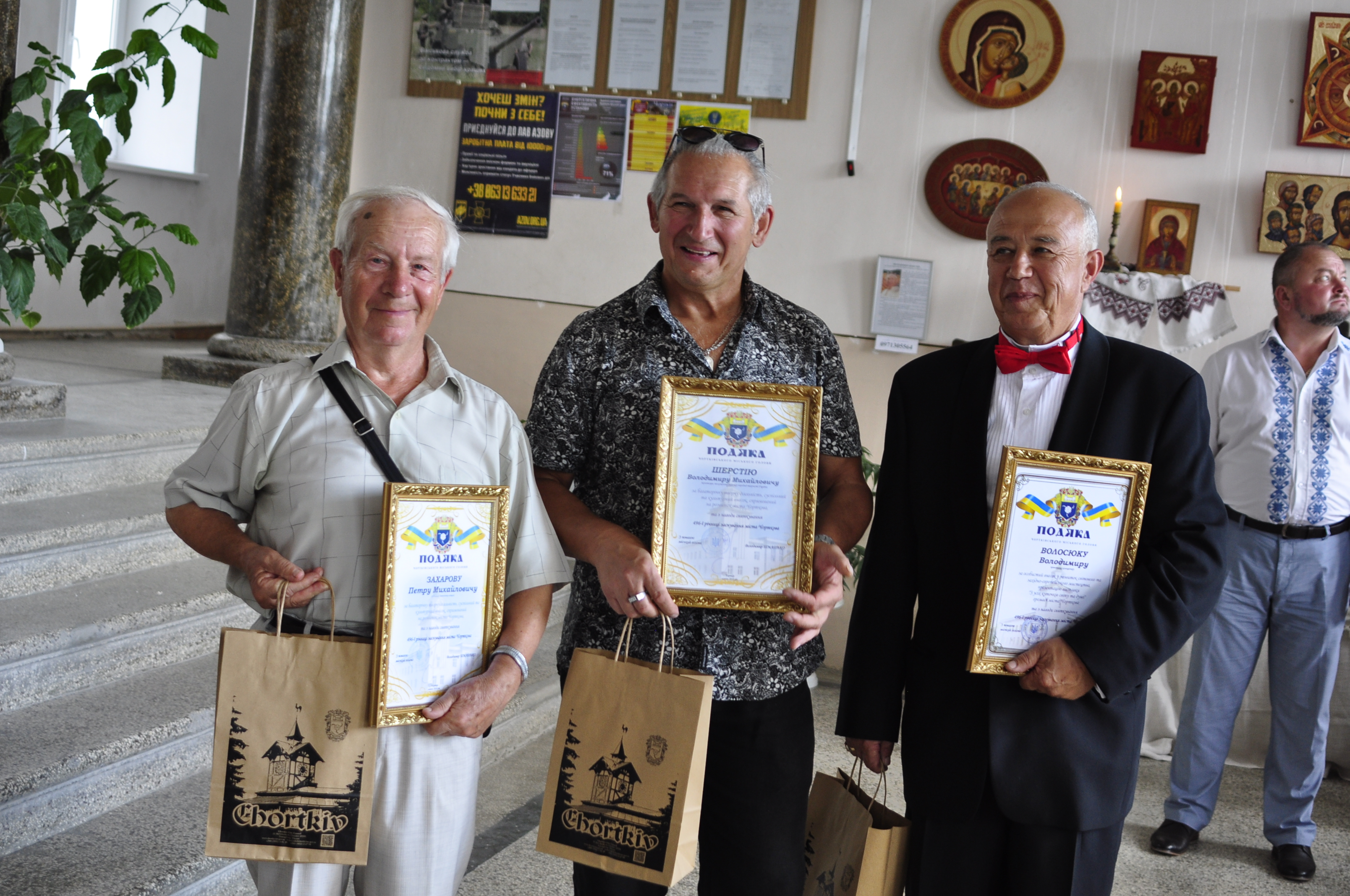 Чортків